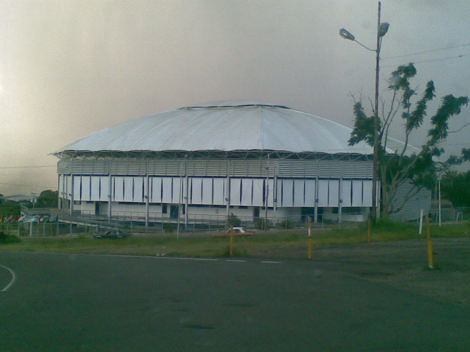 Estadio de fútbol de salón. Pueblo Nuevo, San Cristóbal, Venezuela